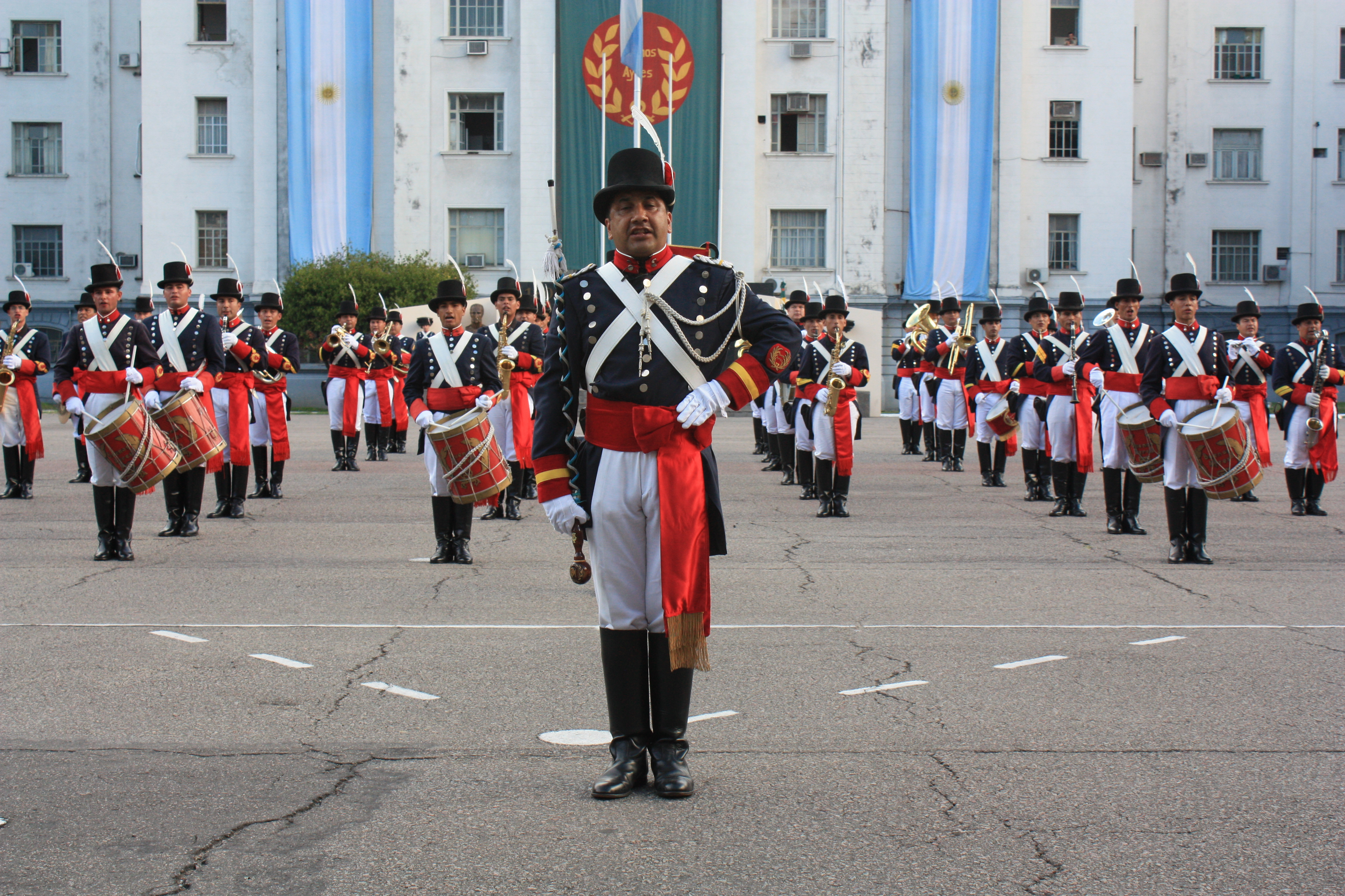 Regimiento de Infantería 1 Patricios